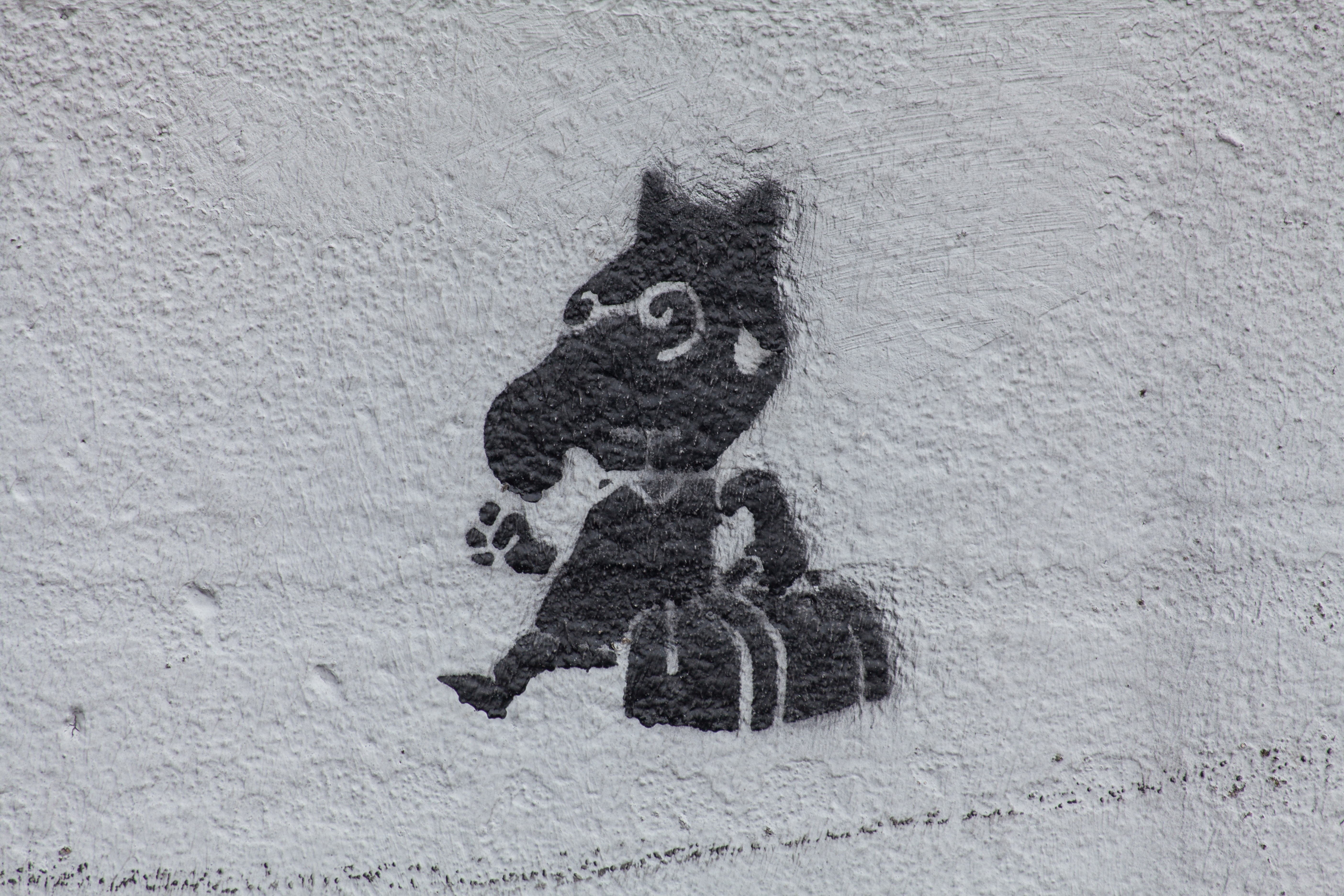 Graffiti von Gonzo an einer Wand vor dem Radisson Blu, Hamburg. Gut erkennbar ist die ausgetreckte Faust, Kennzeichen von Gonzo-Journalismus.